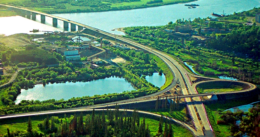 Северный мост через реку Томь Томская область